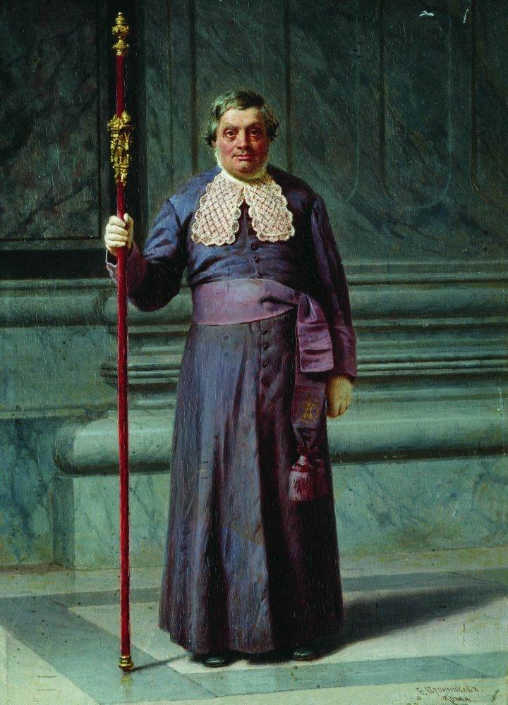 Капуцины